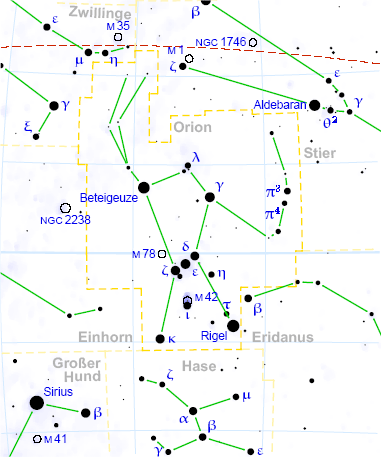 Sternkarte des Sternbilds Orion